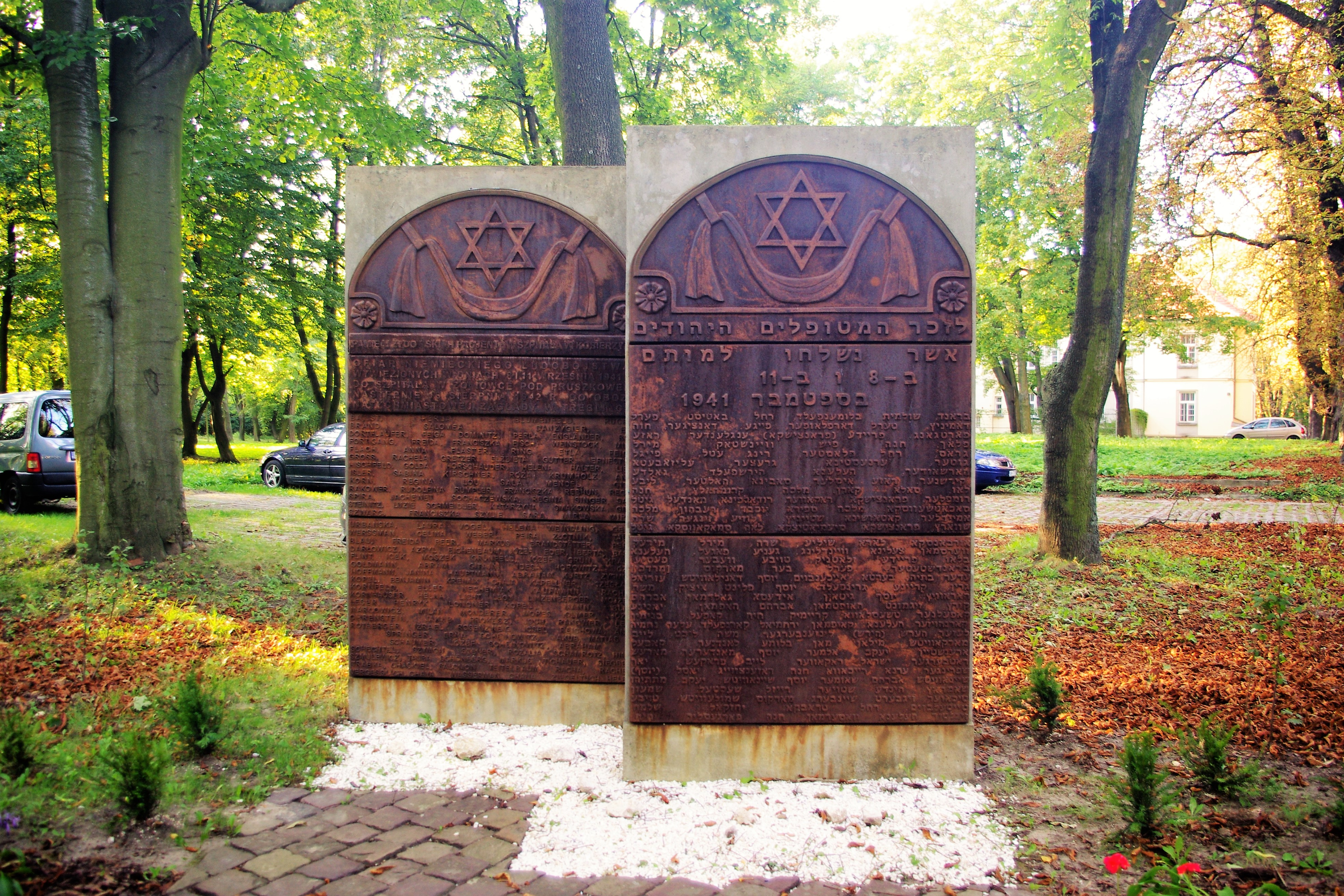 Symboliczne macewy na terenie dawnego Zakładu dla Umysłowo i Nerwowo Chorych w Kobierzynie upamiętniające osoby pochodzenia żydowskiego zamordowane przez przedstawicieli III Rzeszy w Kobierzynie 23 czerwca 1942